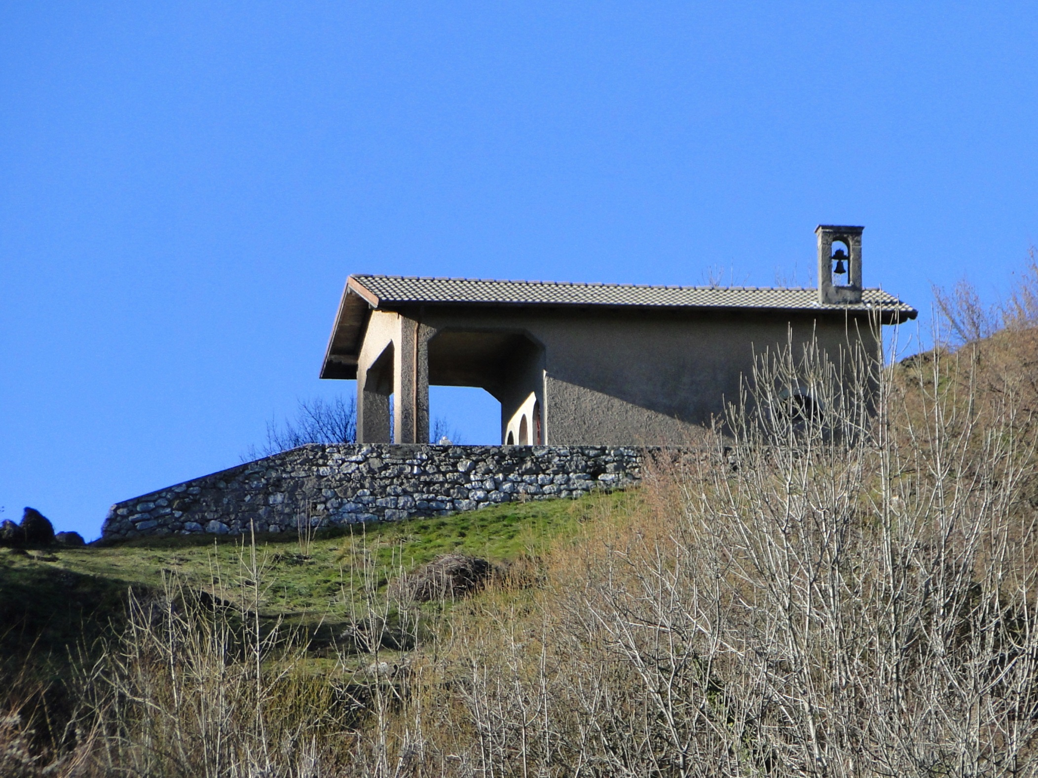 Monte di Nese, fraz. di Alzano Lombardo (BG). Chiesa della Forcella